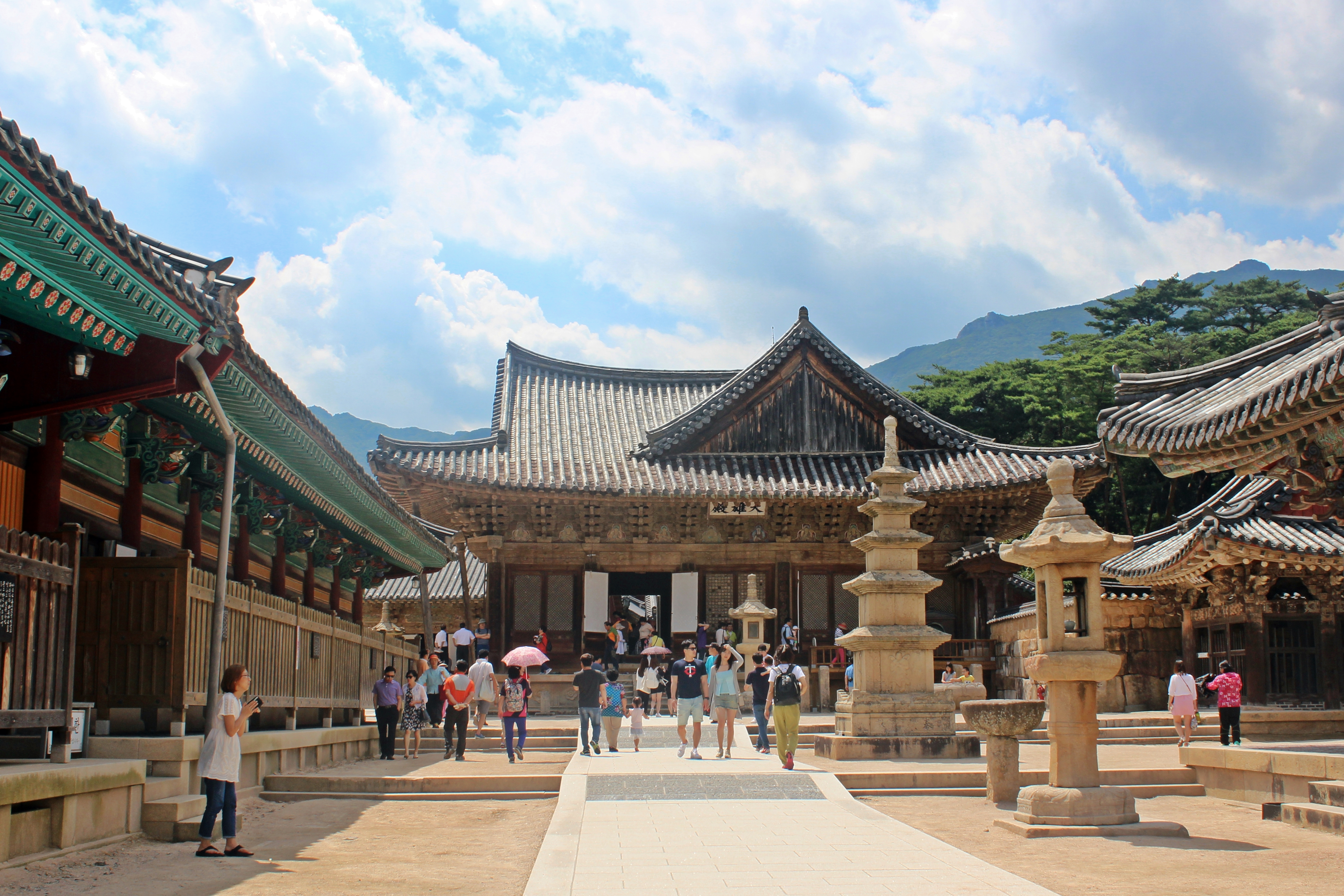 통도사 대웅전 2